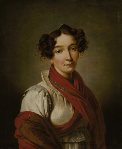 Екатерина Ивановна Голицына (1784-1824), урождённая Соллогуб. С 1801 года жена князя Григория Сергеевича Голицына (1779-1848).